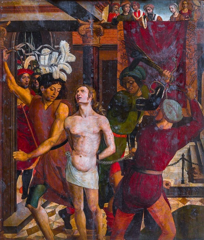 Flagelación de san Pelayo, Málaga, Catedral, capilla del Sagrado Corazón. Tabla procedente del primitivo retablo mayor de la iglesia de San Pelayo de Becerril de Campos, Palencia.